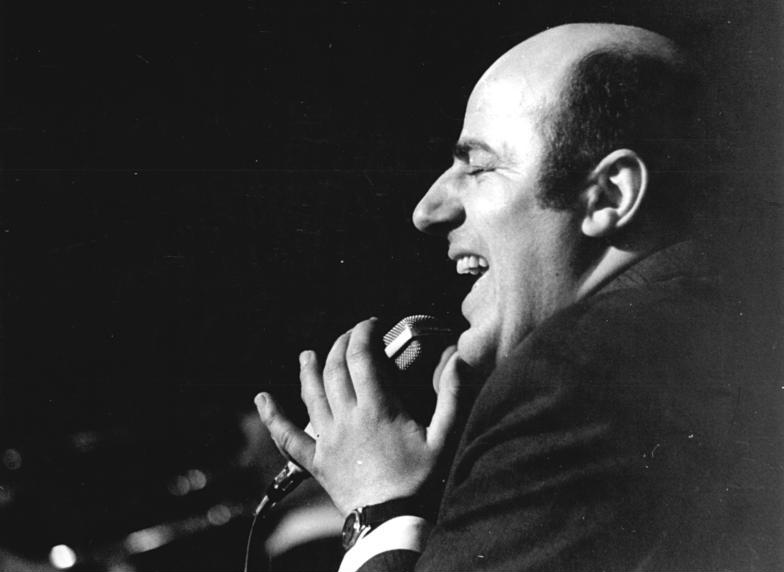 ADN-ZB-Franke-22.2.72-pe-Berlin: Manfred Krug gehört zu den profiliertesten Künstlern der DDR, die auf dem Gebiet der heiteren Muse wirken. Der vielseitige Künstler singt mit gleichem Erfolg Jazz, Folklore, Chansons und Schlager, meistert großartig die Partie des Sporting Life in Gershwins Oper "Porgy und Bess" und ist zugleich ein sehr guter Schauspieler."